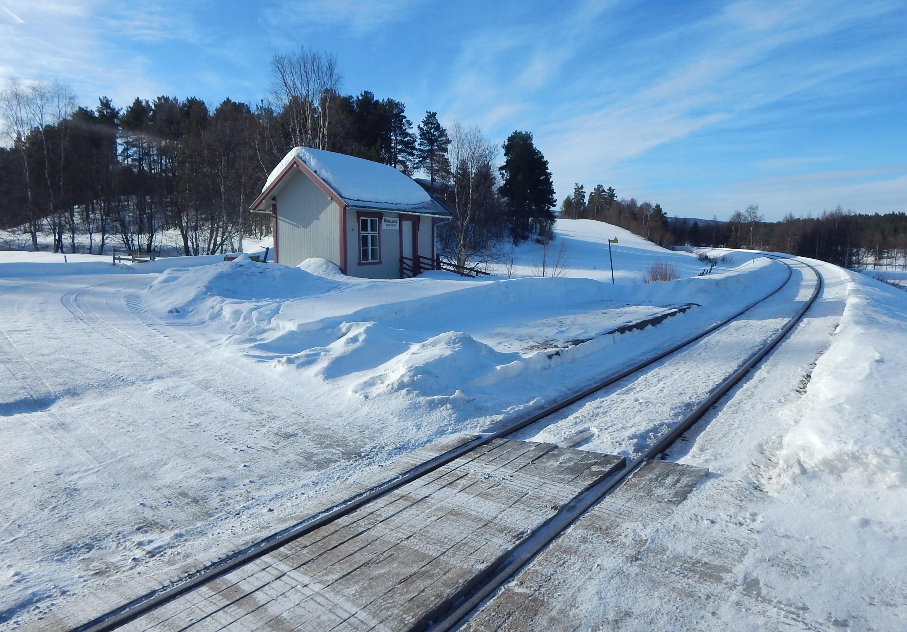 Håmålvoll stoppested på Rørosbanen